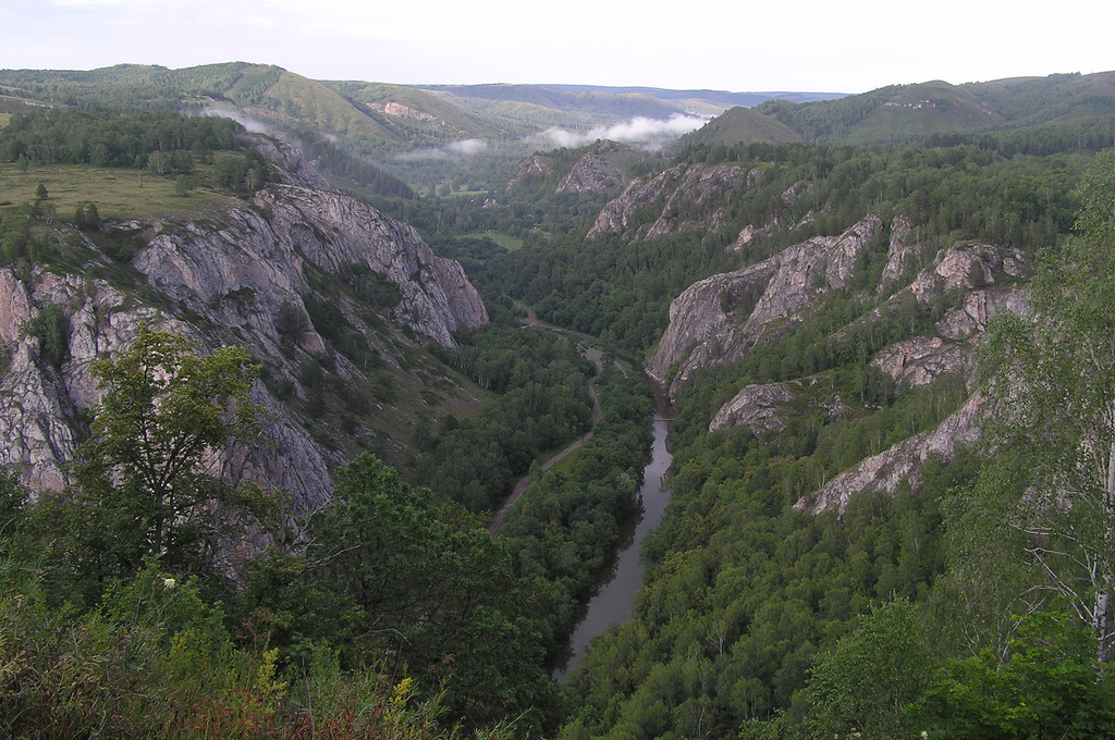 Bashkiria's mountains